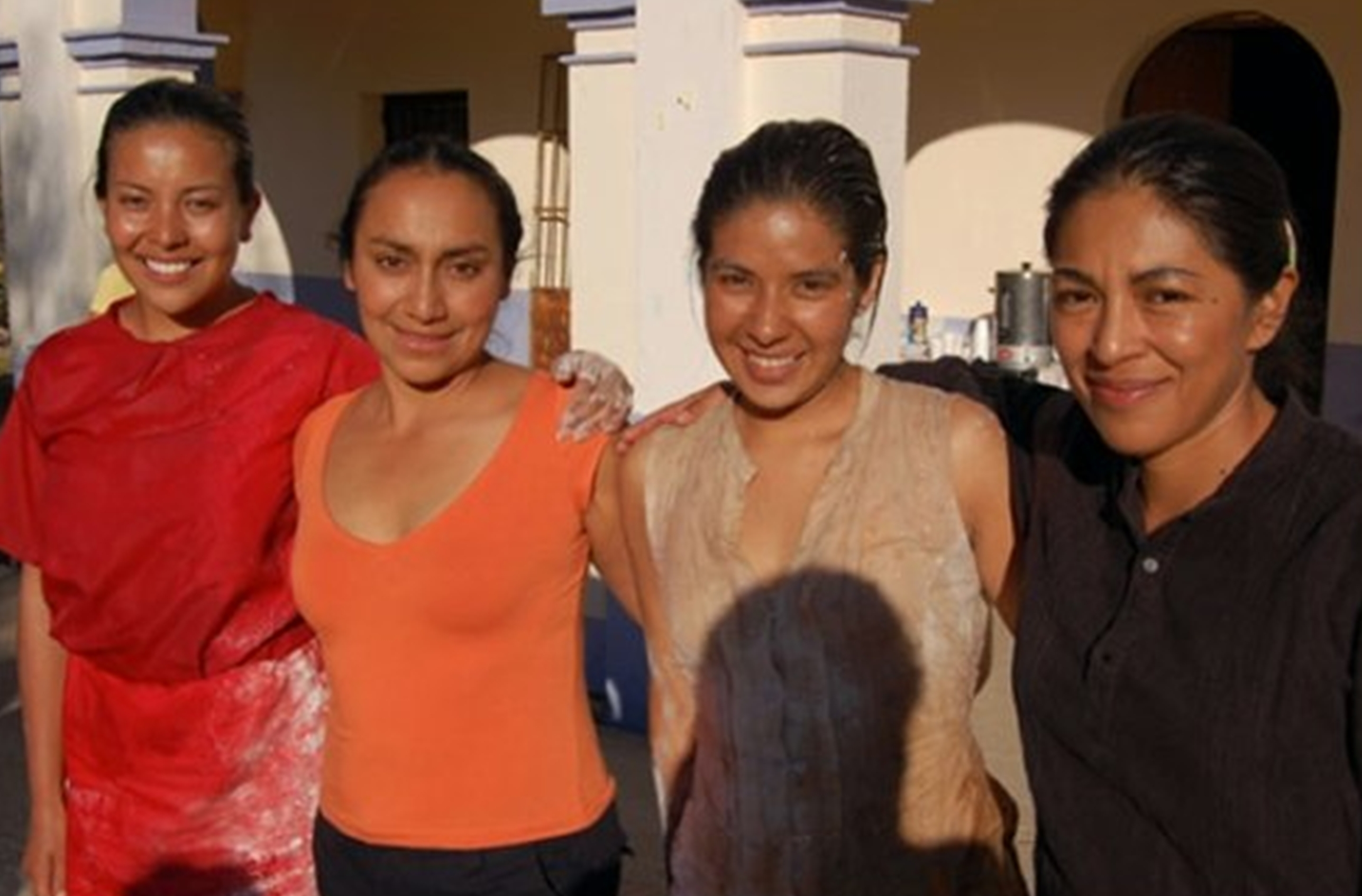 Las actrices de la cinta mexicana espiral.